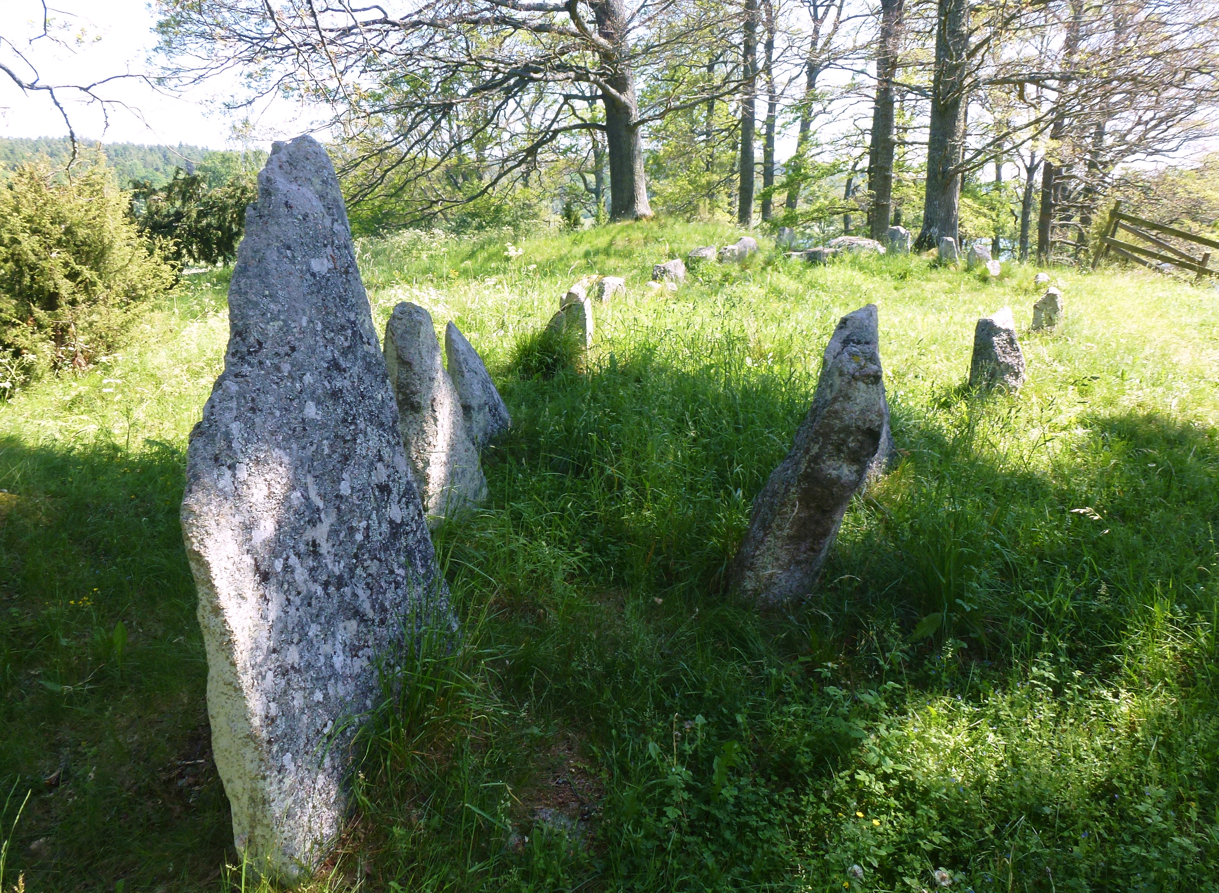 Gumhems gravfält, skeppsättning